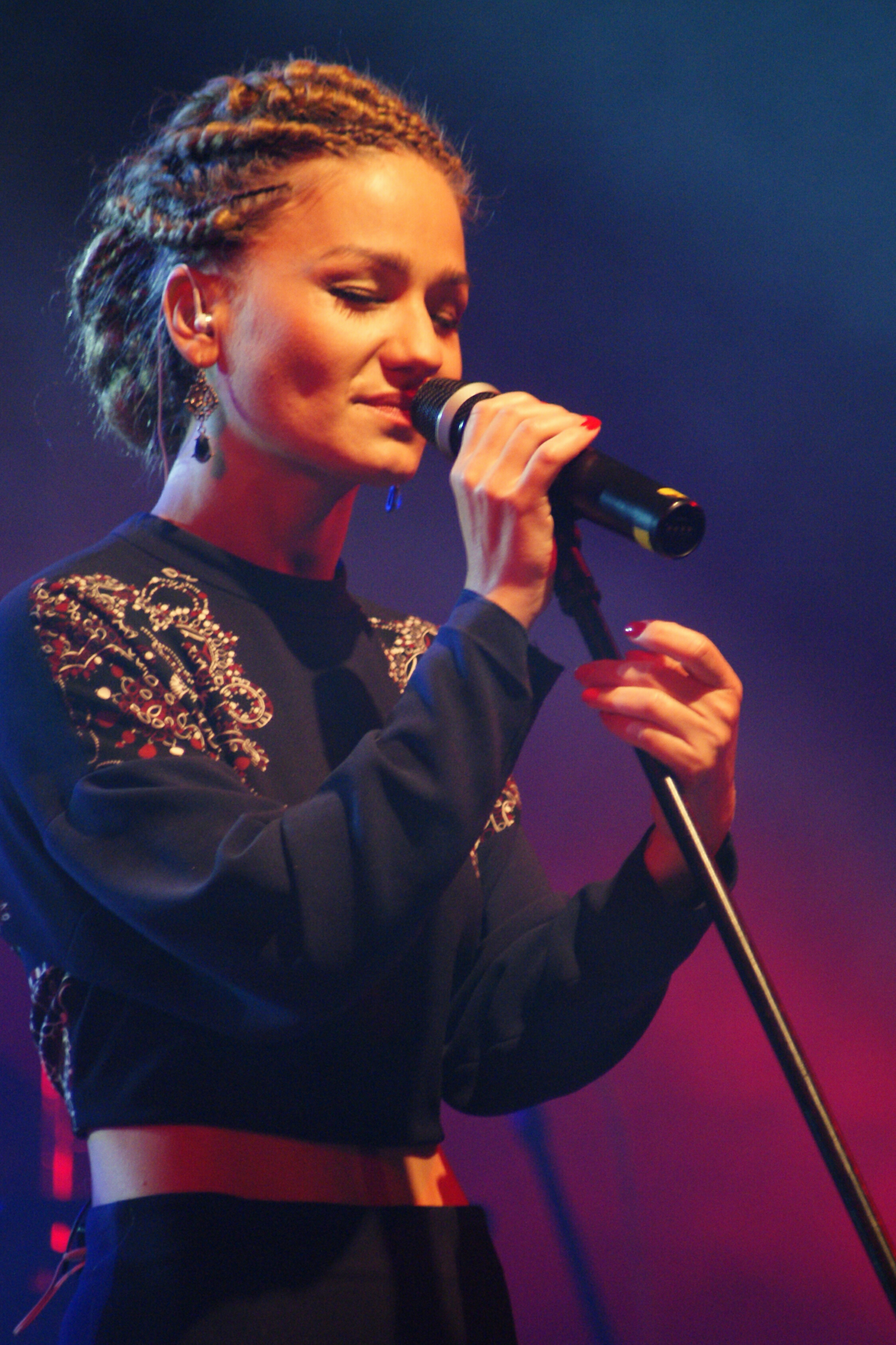 Marika